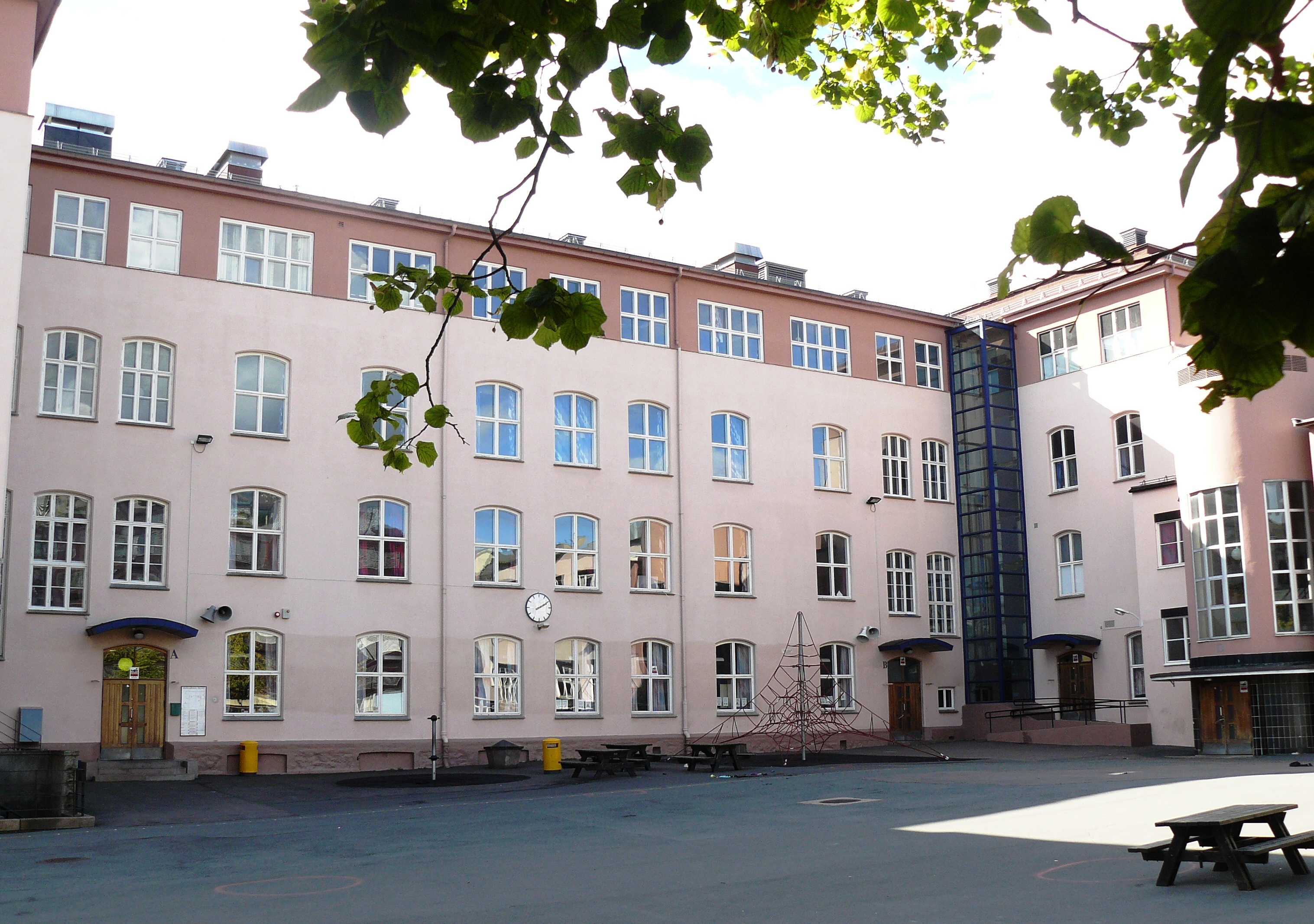 Ruseløkka skole i Oslo.